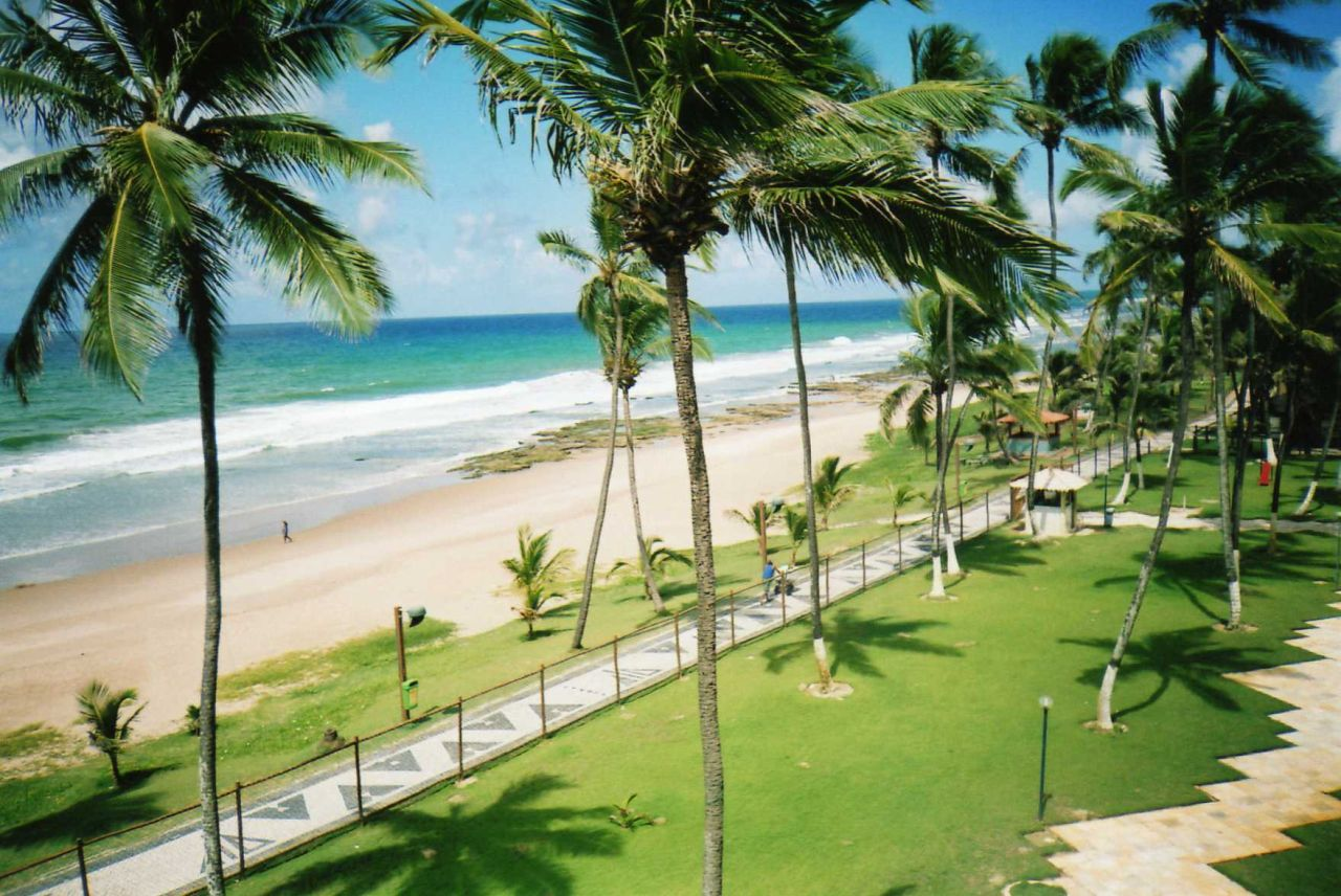 Salvador - Vilas do Atlântico